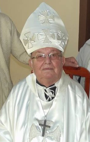 dom agostino